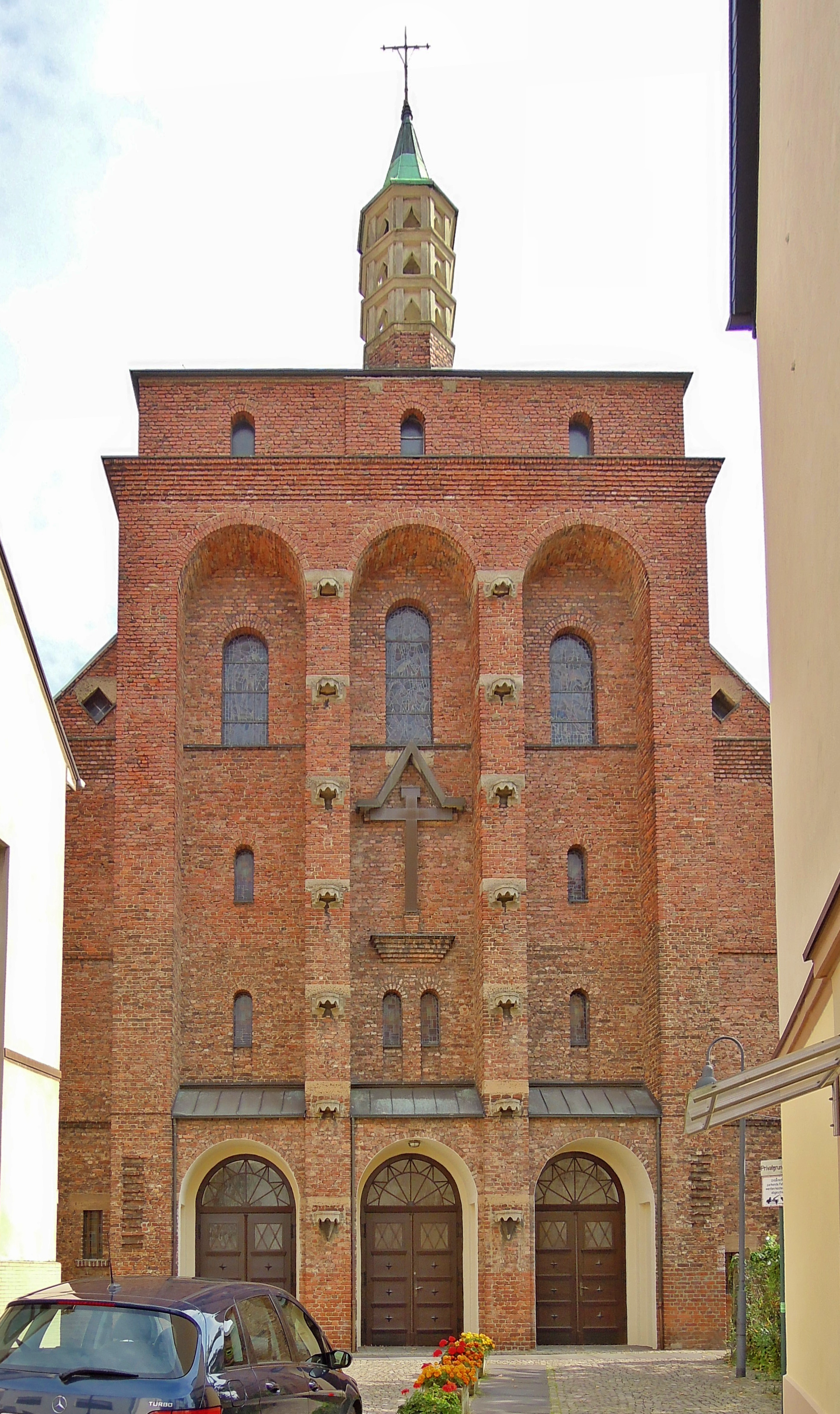 Am Kloster 6, kath. Pfarrkirche Allerheiligen, 1927–29 von Peter Marx (Einzeldenkmal)